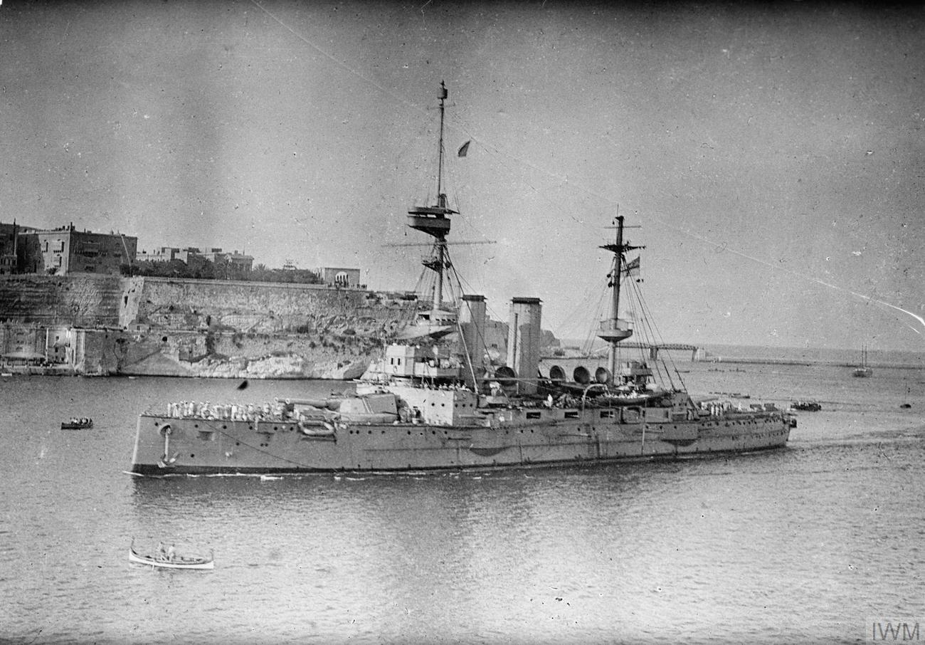 HMS LONDON entering Malta Harbour, 1915.